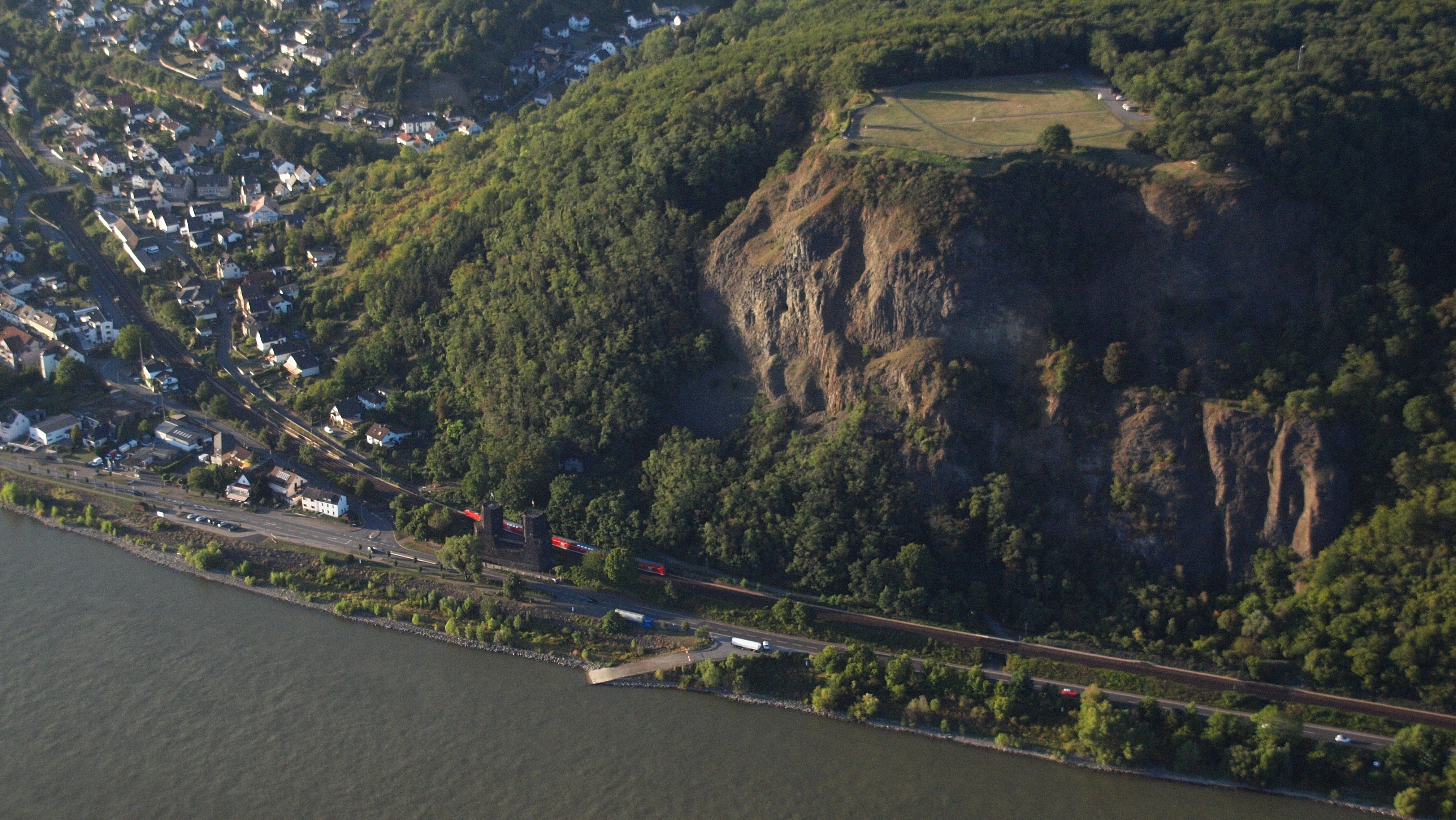 Luftaufnahme der Erpeler Ley am Rhein in Erpel: links Teile des Orts Erpel, am Rheinufer die östlichen Pfeiler der Ludendorff-Brücke, große Teile des Bergs (Felsen und offenes Plateau) im Naturschutzgebiet „Erpeler Ley“